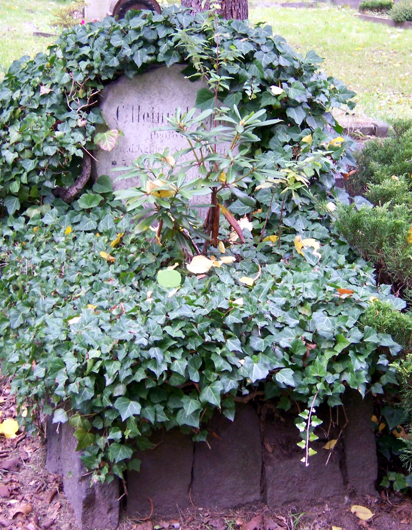 Grab des deutschen Bildhauers Heinrich Epler auf dem Johannisfriedhof in Dresden.